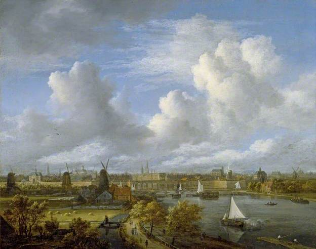 View on the Amstel Looking towards Amsterdam